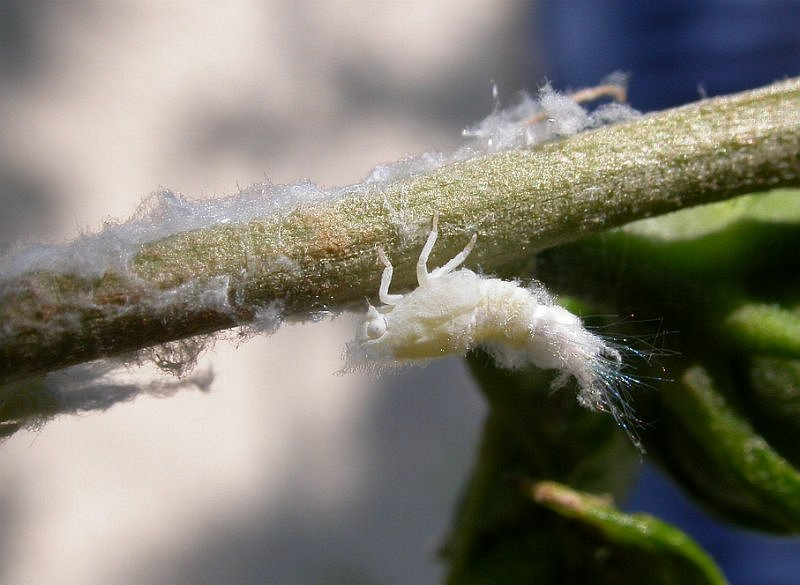 Larve de Metcalfa pruinosa Gradignan, Gironde, France